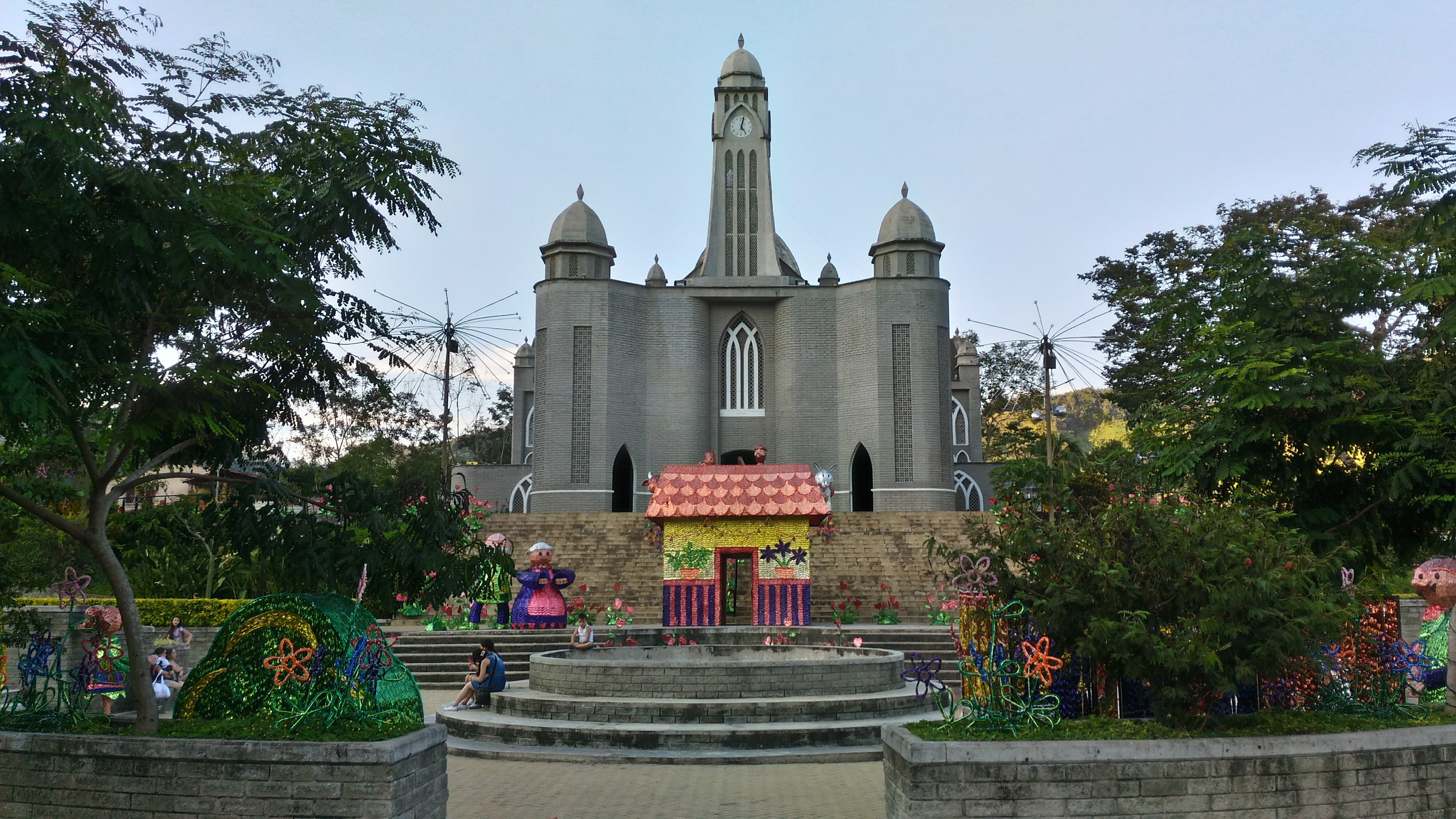 Esta fotografía fue tomada en el municipio colombiano con código 05142.